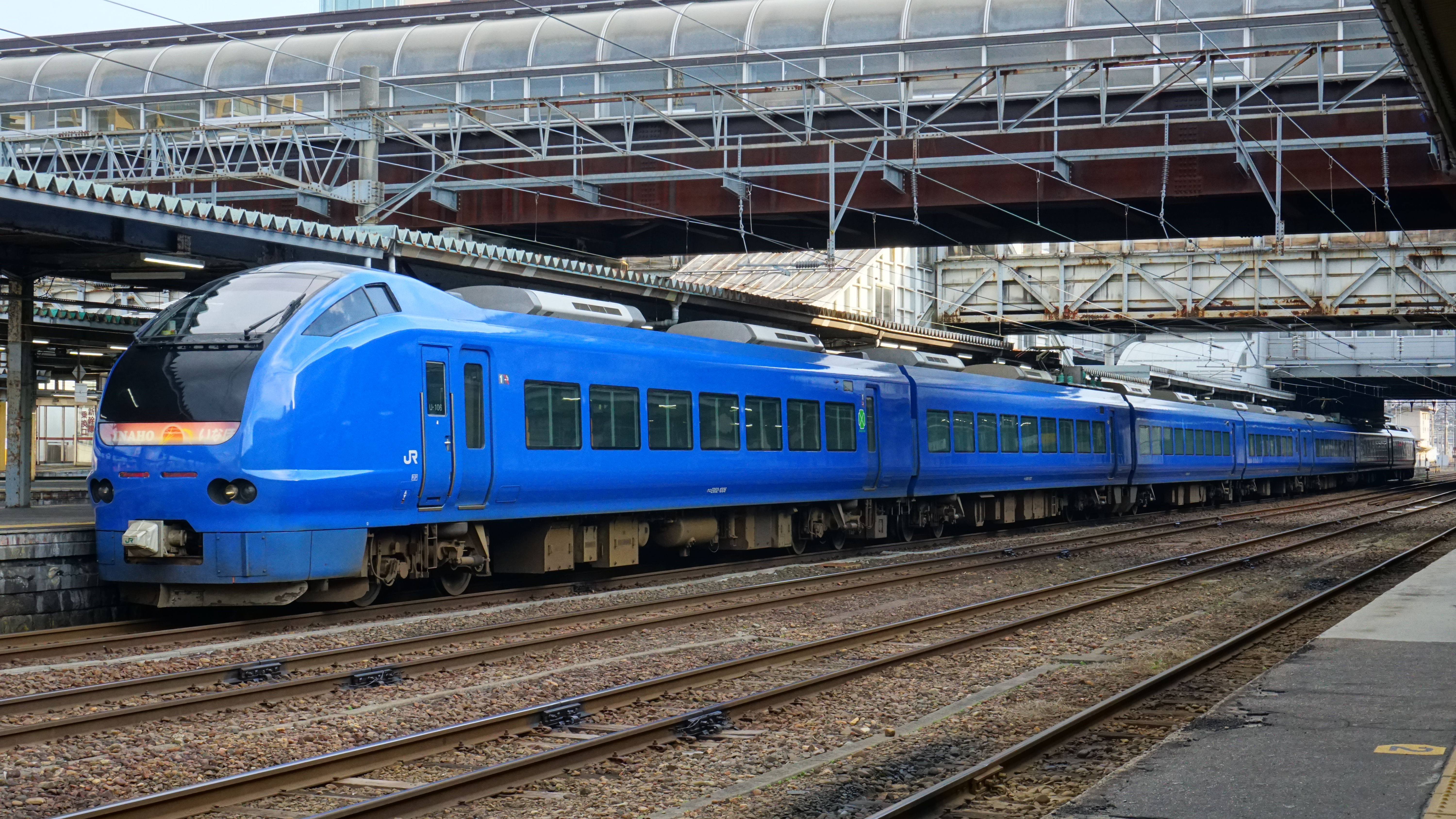 秋田駅に停車中の特急「いなほ」用E653系1000番代7連。このU106編成は日本海をイメージした瑠璃色の塗装を纏っている。